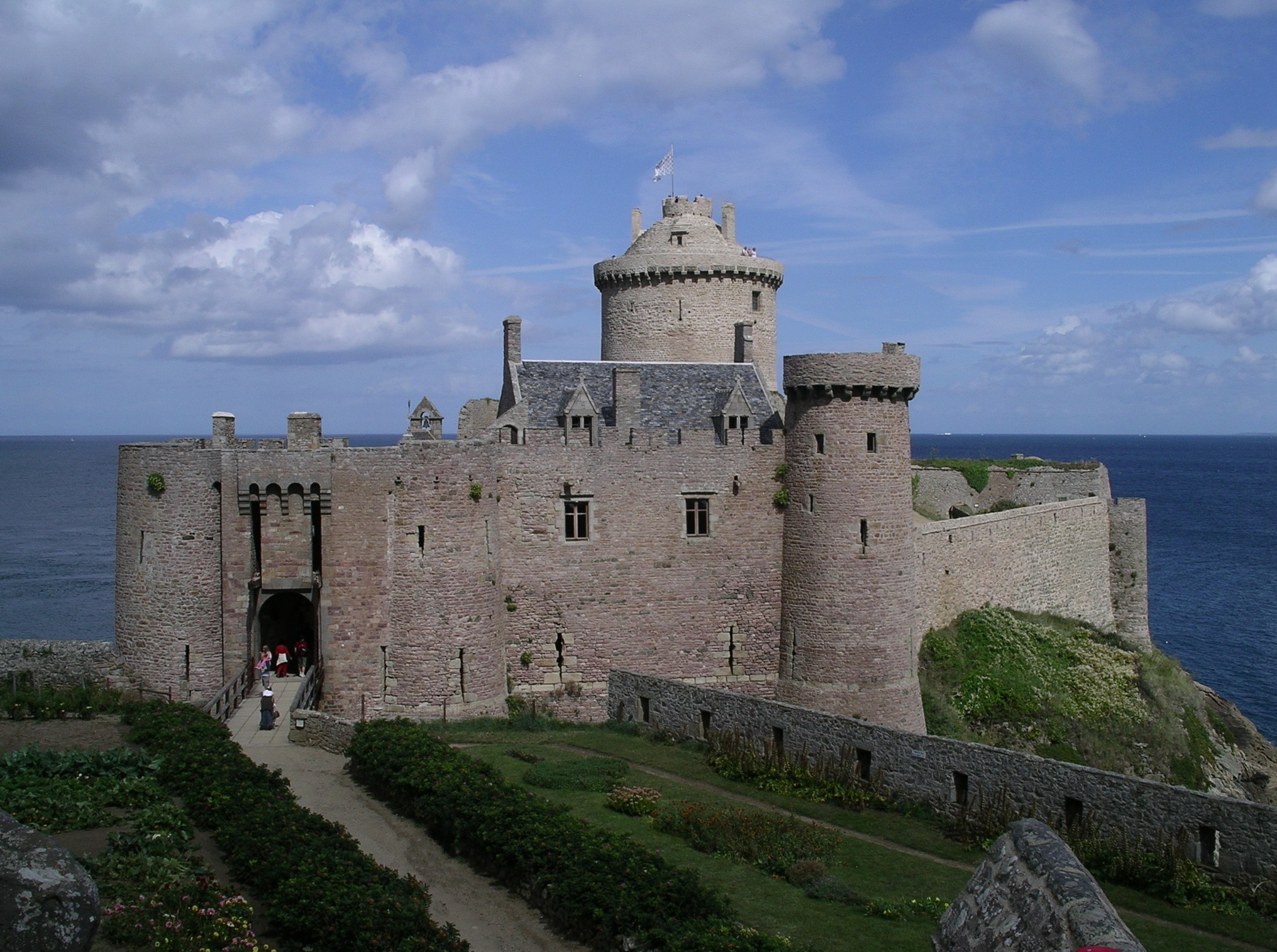 Le Fort La Latte ( Bretagne, France)